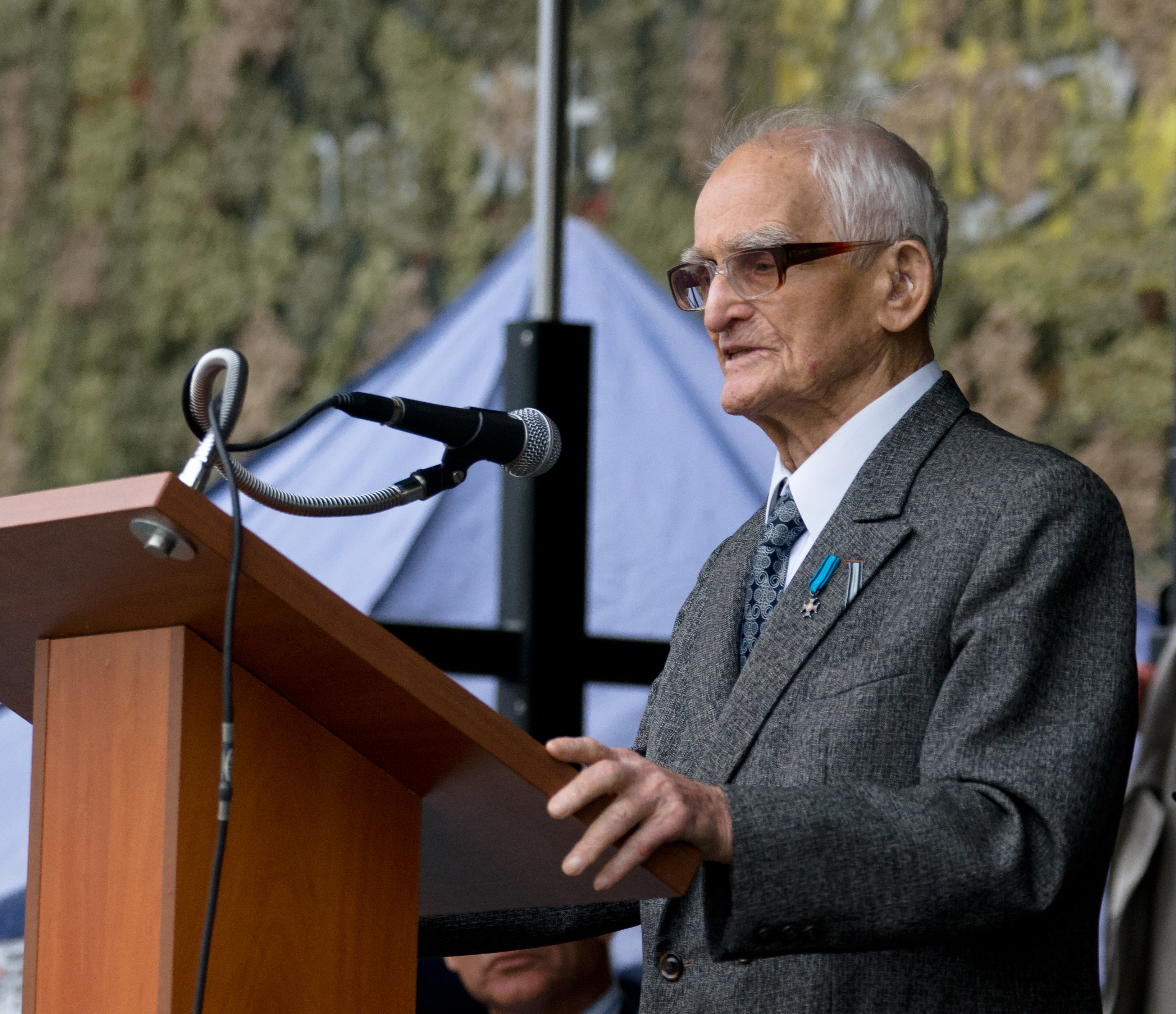 Przemówienie majora Stanisława Ślesickiego, ostatniego żyjącego żołnierza biorącego udział w bitwie pod Mławą. Był dowódcą III plutonu, 8 kompanii, 80 Pułku Piechoty Strzelców Nowogródzkich. Za męstwo został odznaczony Orderem Virtuti Militari. V rekonstrukcja Bitwy o Mławę - inscenizacja nalotu na miasto.